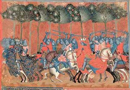 Chronik Dalimil